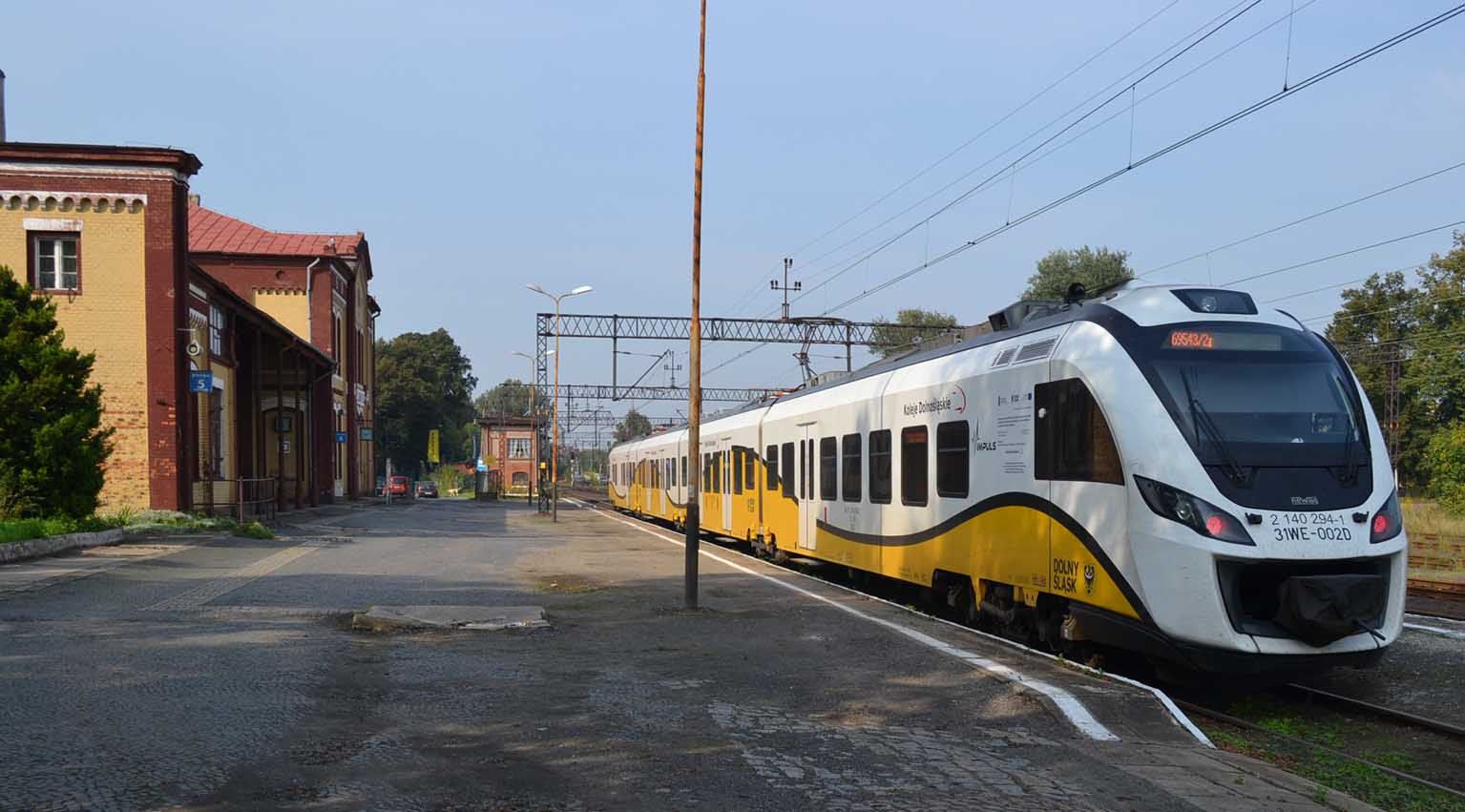 Newag-Impuls Triebzug im Bf Lauban, 2014